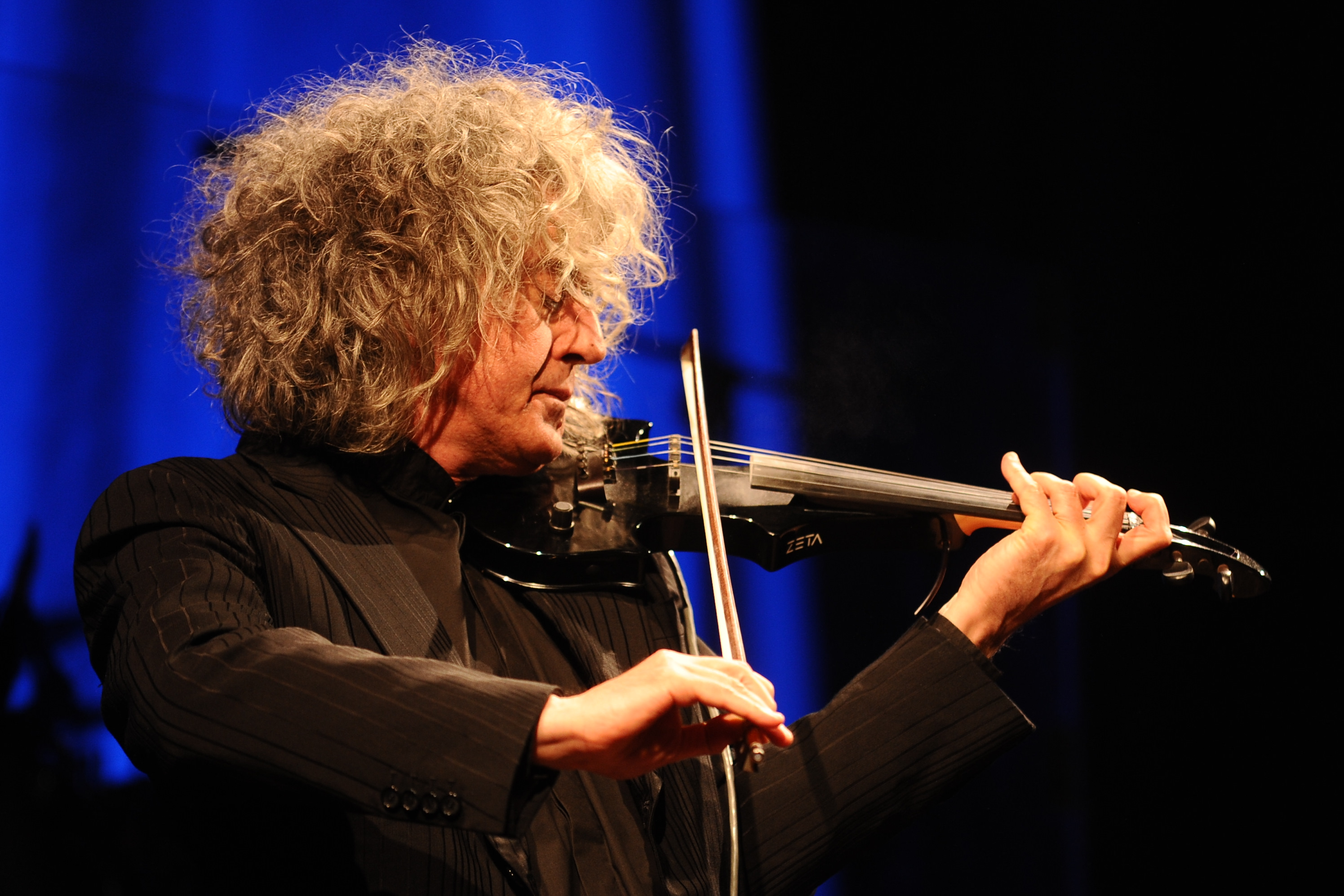 Angelo Branduardi in concerto a Trento.